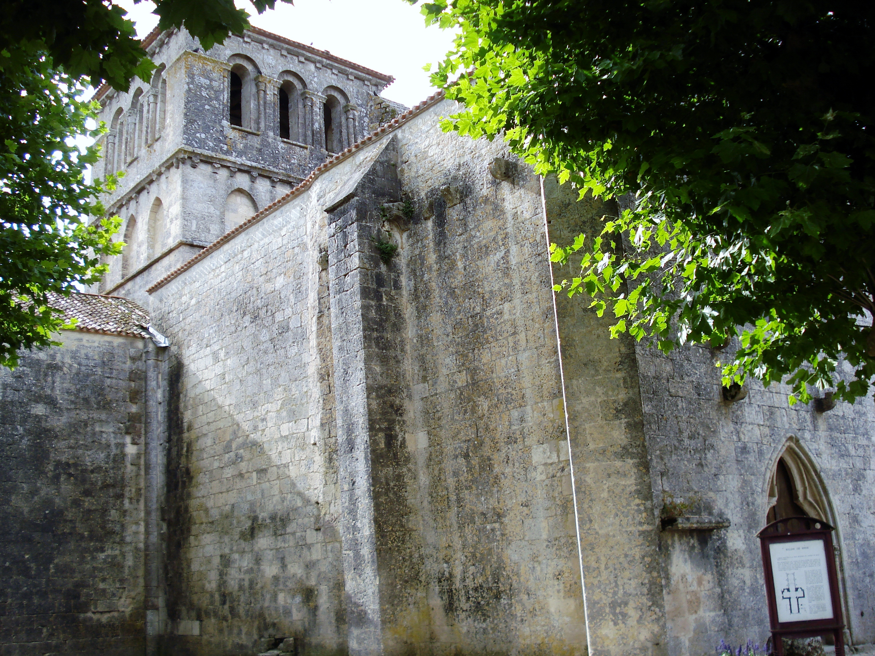 Eglise de Néré en Charente-Maritime